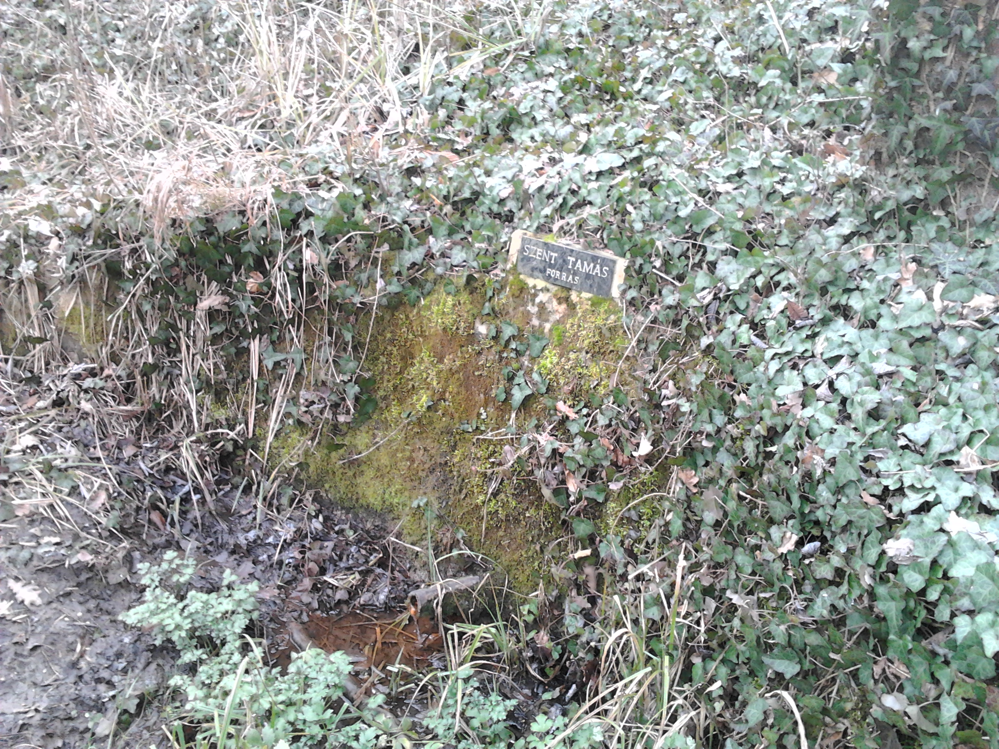 A Szent Tamás forrás Tata város délnyugati részén helyezkedik el, nem messze az M1-es autópályától. A forrás vize emberi fogyasztásra nem alkalmas.